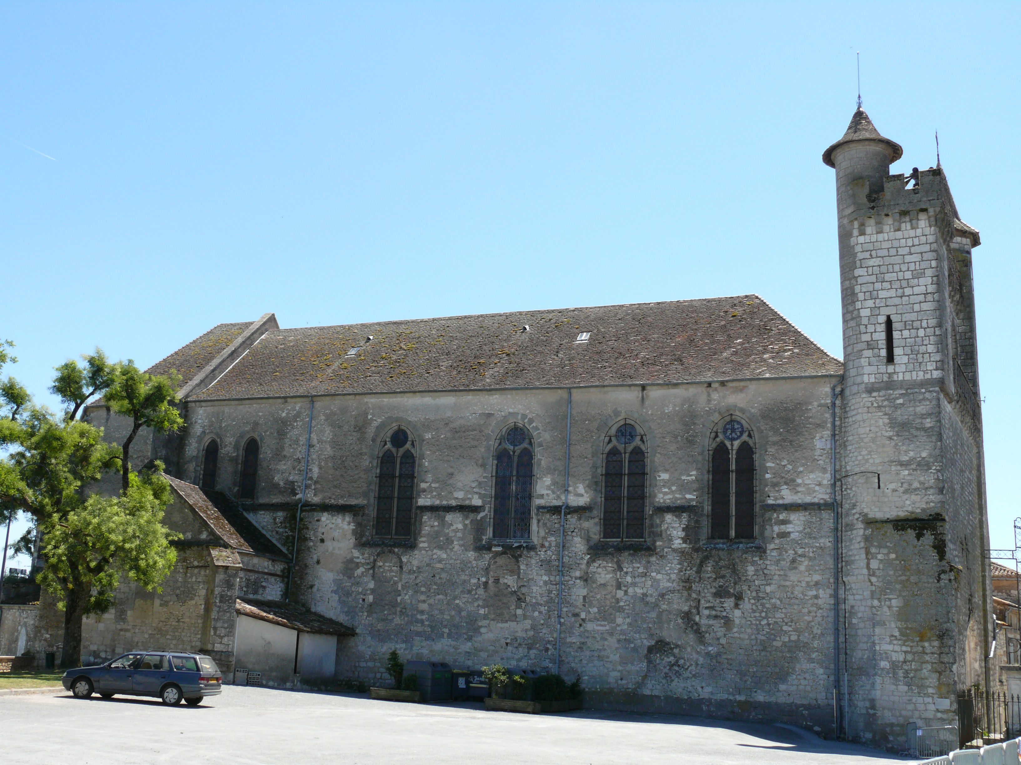 Monflanquin - Eglise Saint-André